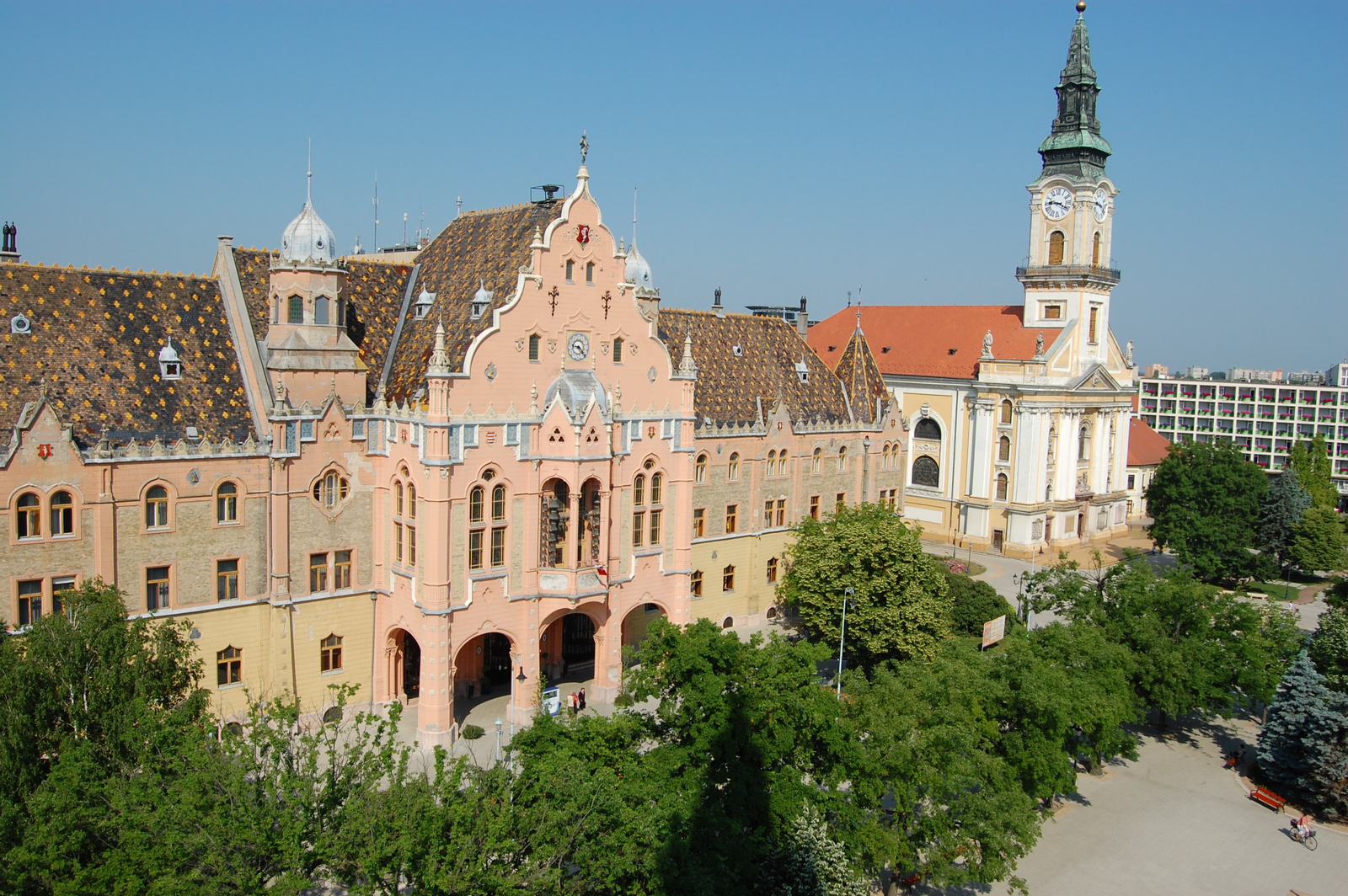 Városháza (Kecskemét, Kossuth tér 1.)